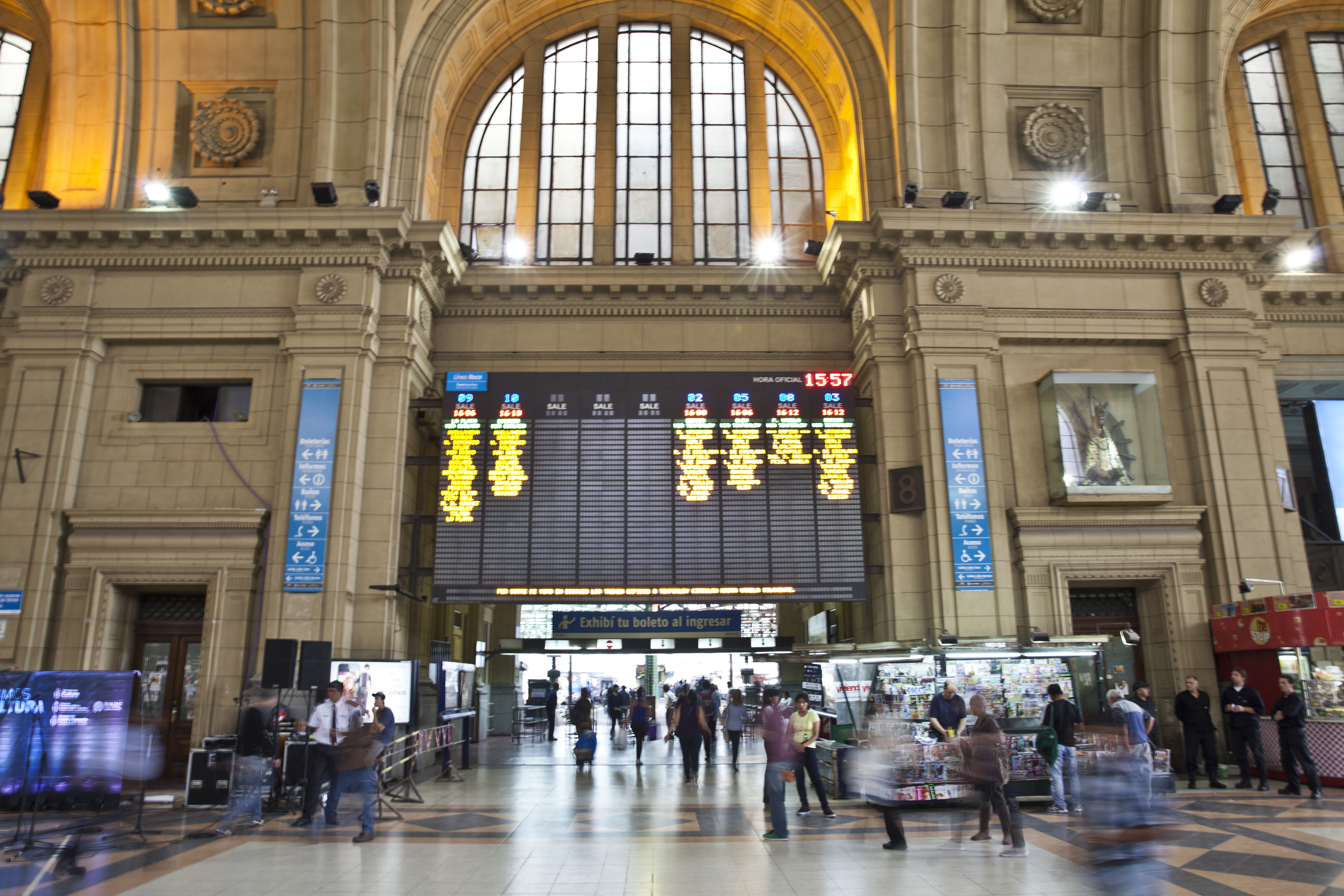 Buenos Aires, 30 de octubre de 2014 - El Plan Nacional Igualdad Cultural −una iniciativa conjunta de los ministerios de Cultura y de Planificación Federal, Inversión Pública y Servicios− y el Ministerio del Interior y Transporte organizaron, un espectáculo musical en el hall de la estación de trenes de Constitución, a cargo de Ayllu Sartañani, un grupo de jóvenes sikuris del altiplano, como parte de las celebraciones por el mes de la diversidad cultural. Fotos: Mauro Rico/ Ministerio de Cultura de la Nación.